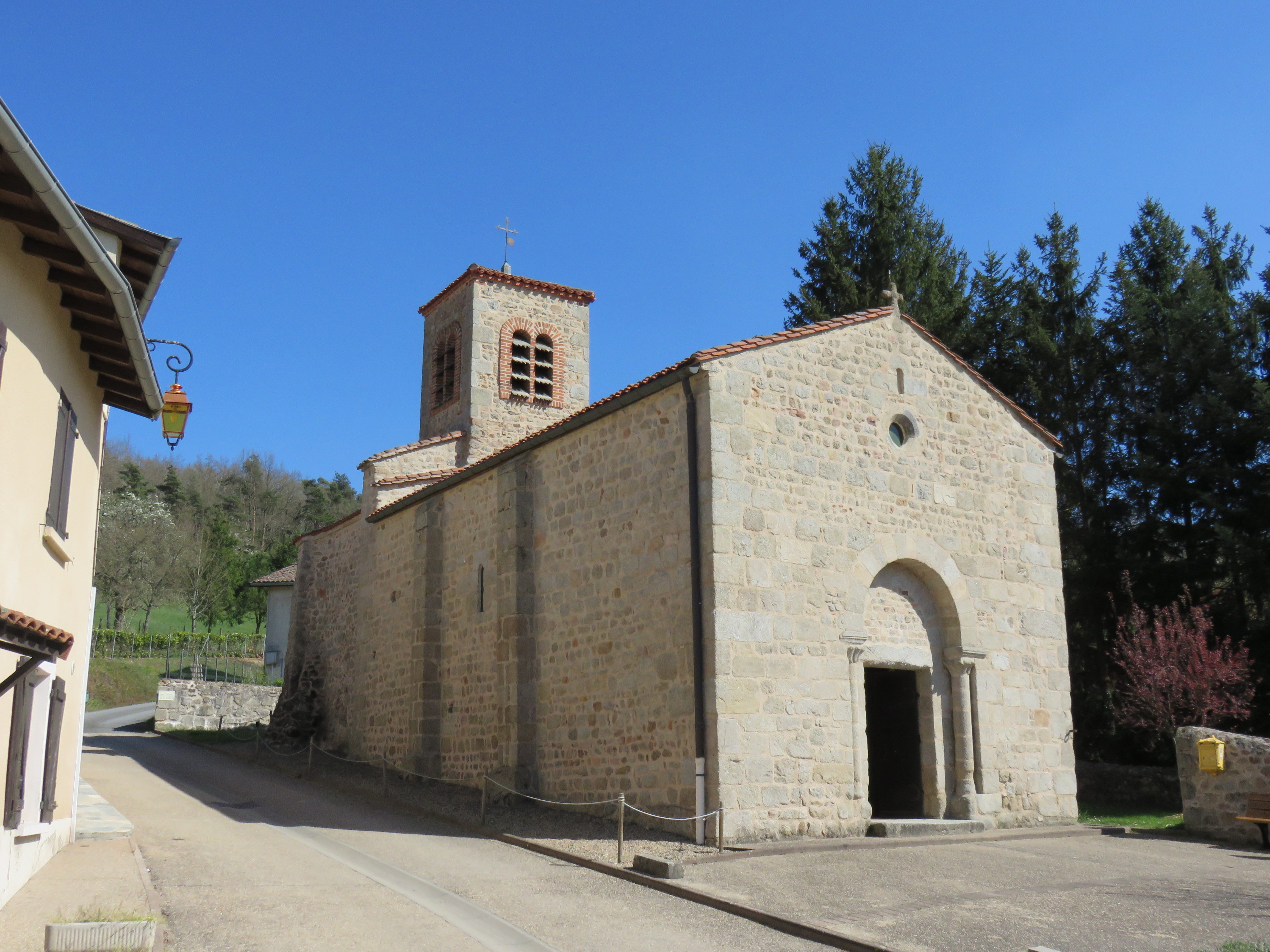 Chapelle de La Valette, monument historique à Salvizinet, dans la Loire. .